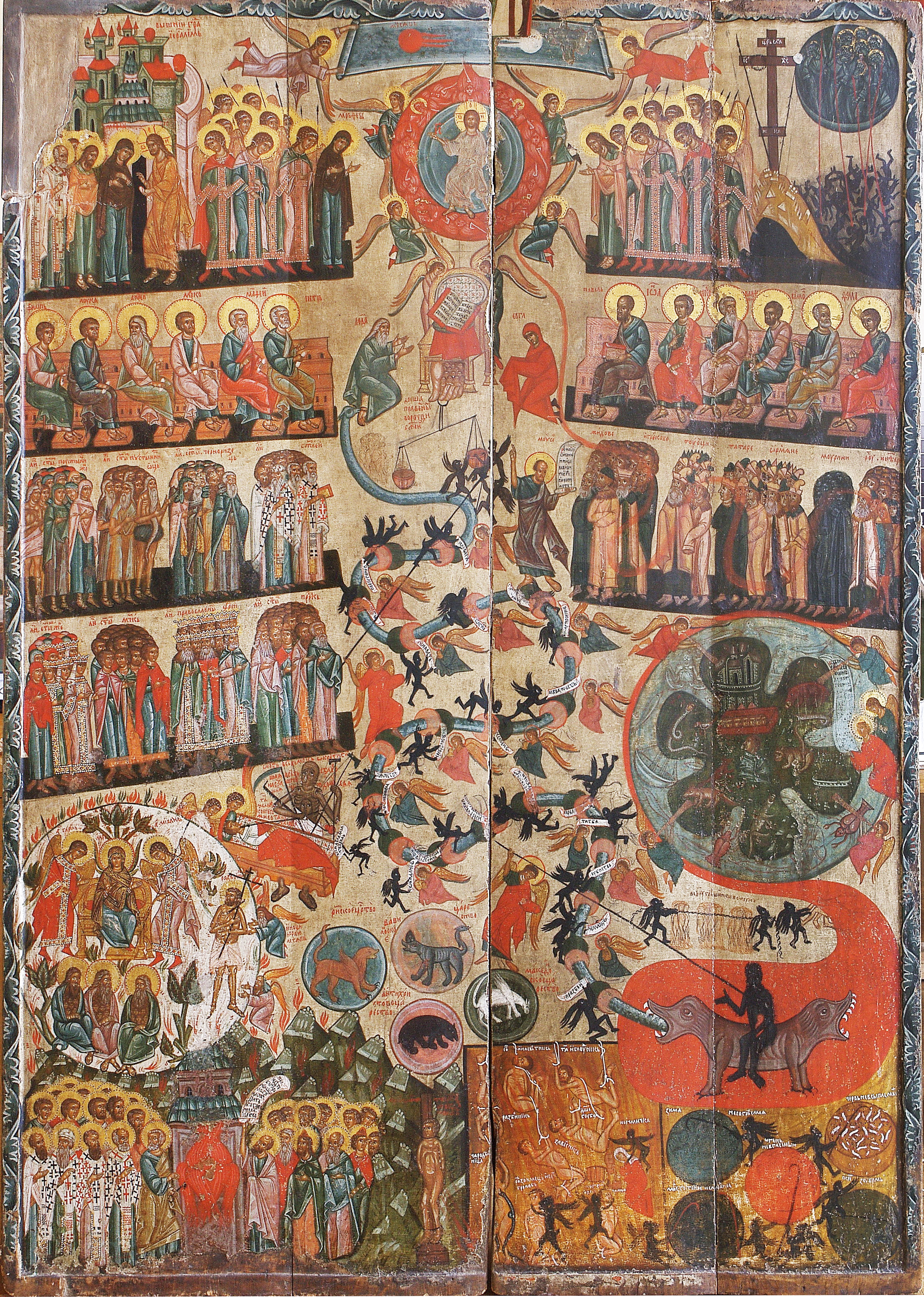 "Страшний Суд" 1560ті с. Мшанець.